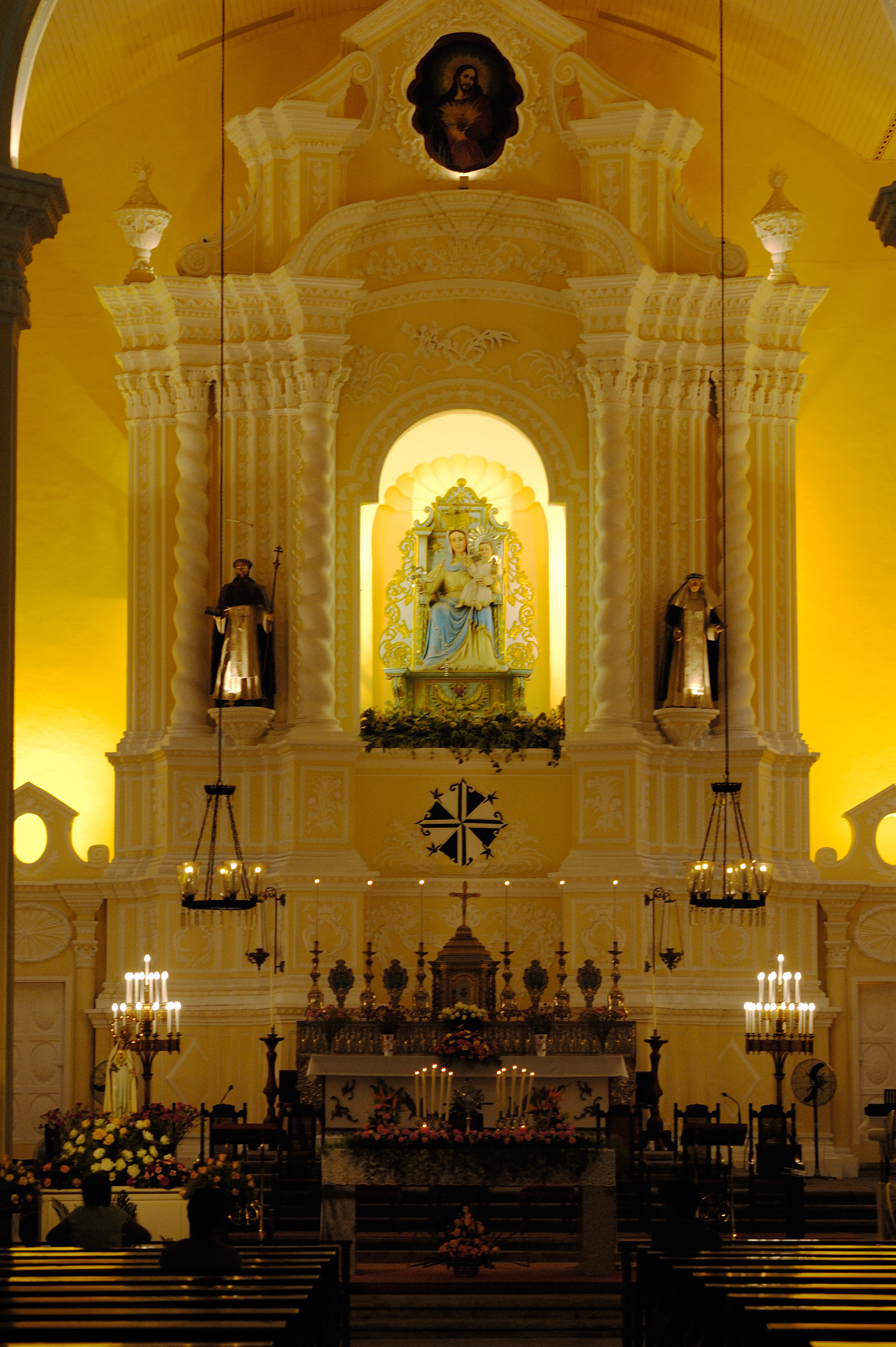 Inner arrangement of Igreja de São Domingos